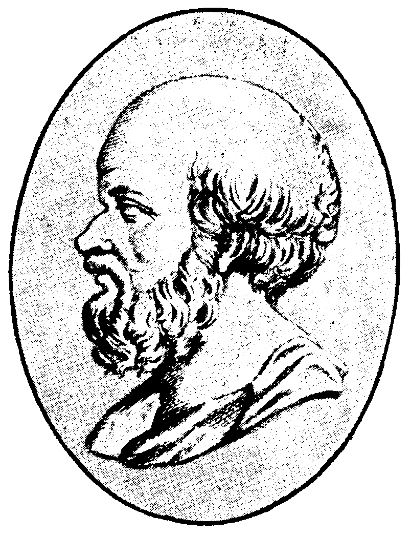 Eratosthenes